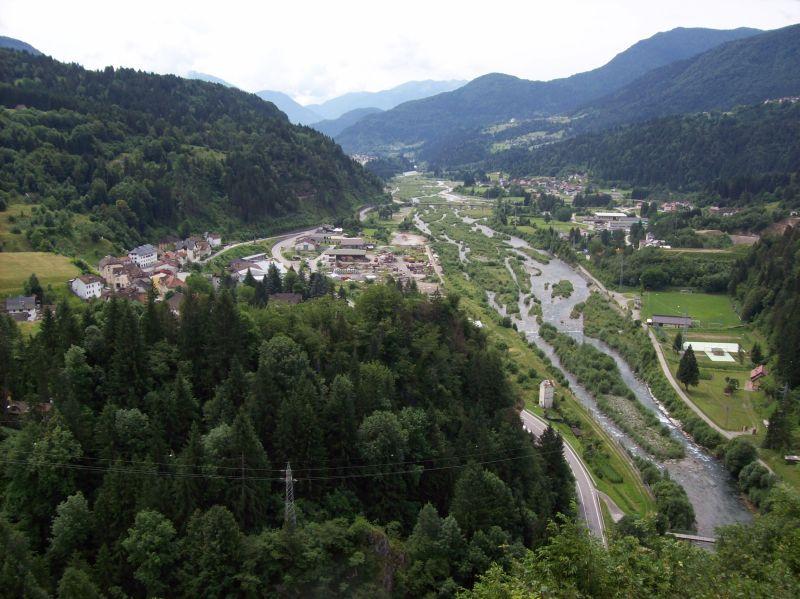 Comeglians (UD - Friuli-Venezia Giulia - Italy) panorama dalla Chiesa di San Giorgio